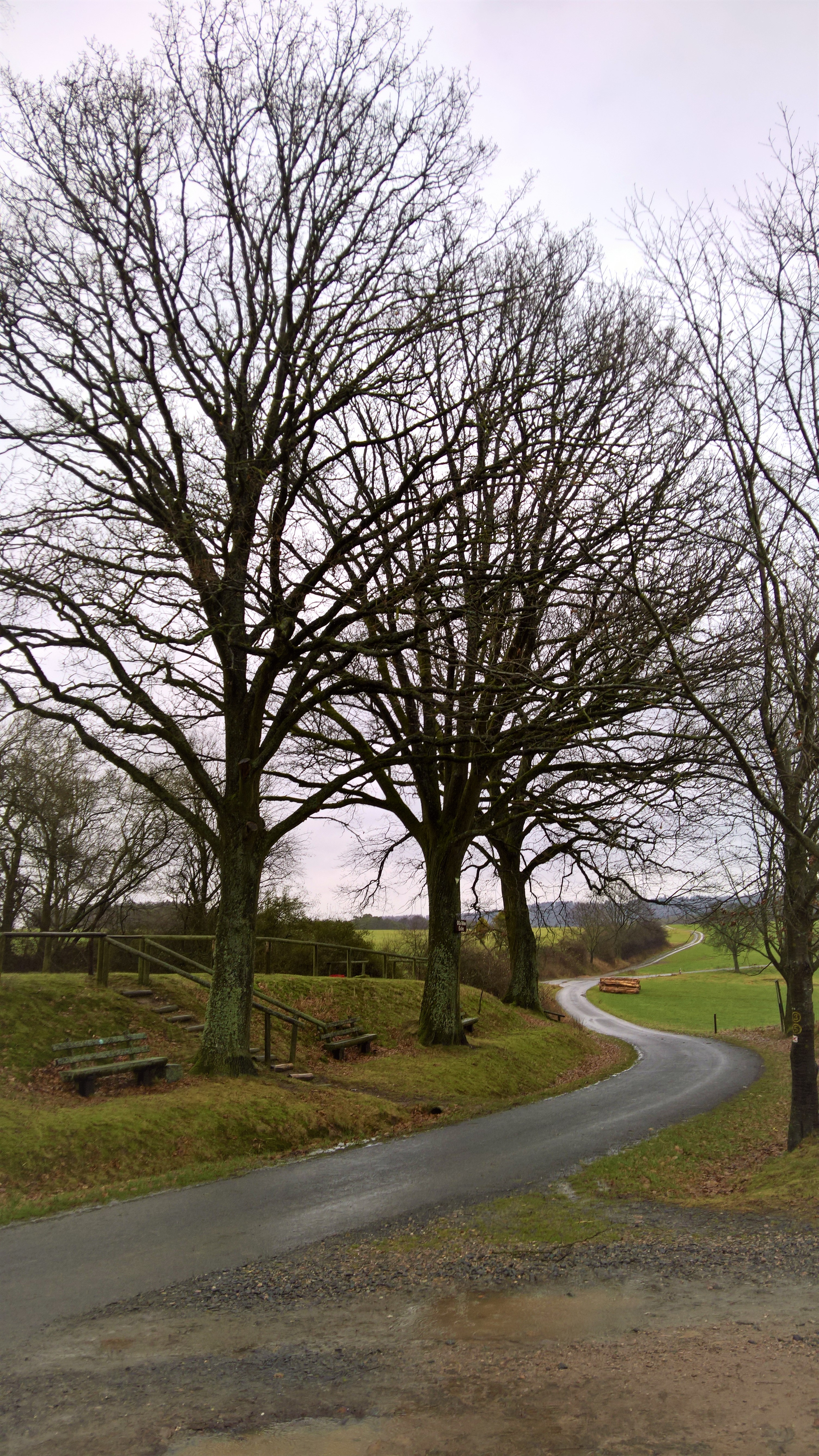 Die Drei Eichen in Momart: Naturdenkmale